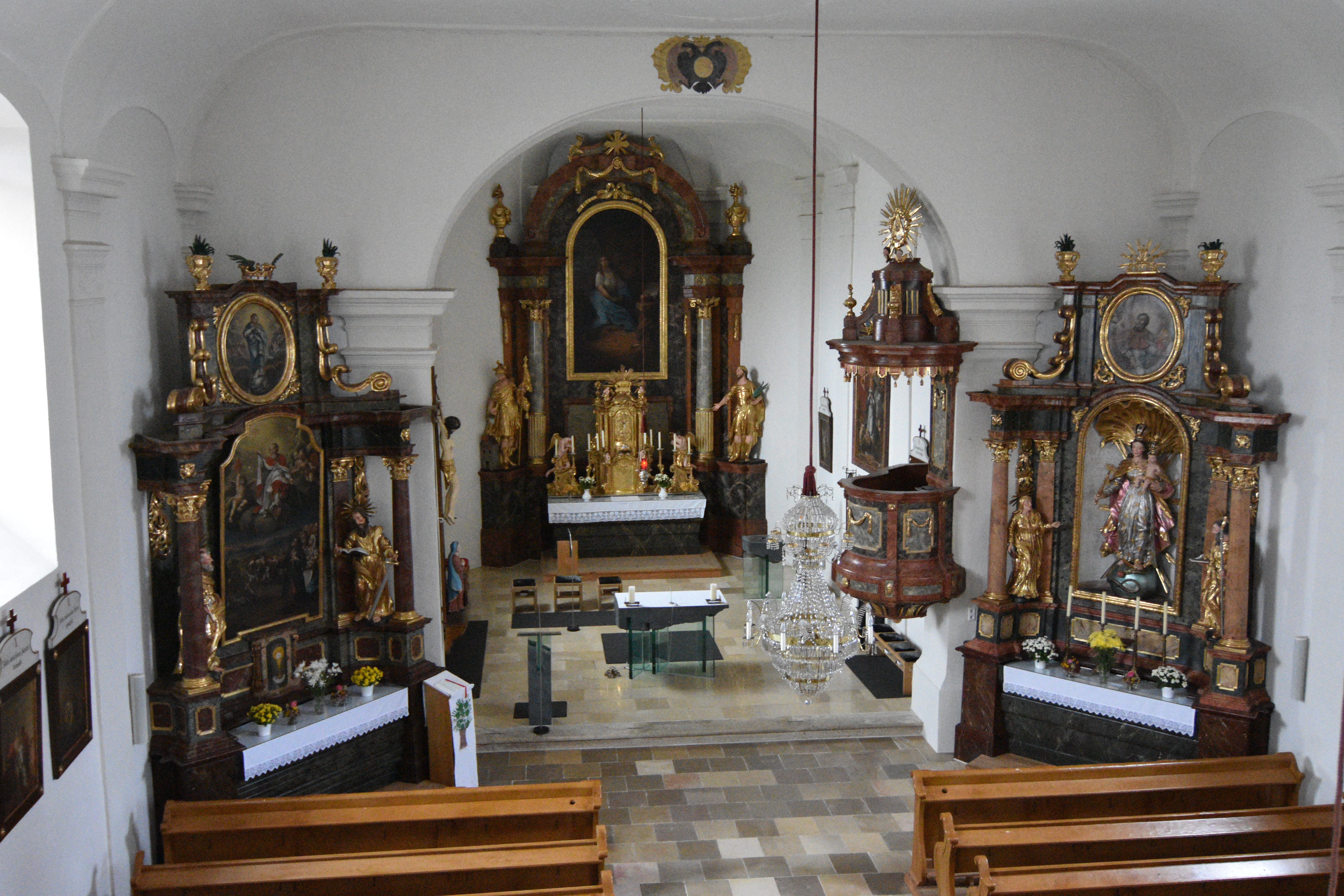 Mary Magdalene Church (Sankt Magdalena am Lemberg) - Interior